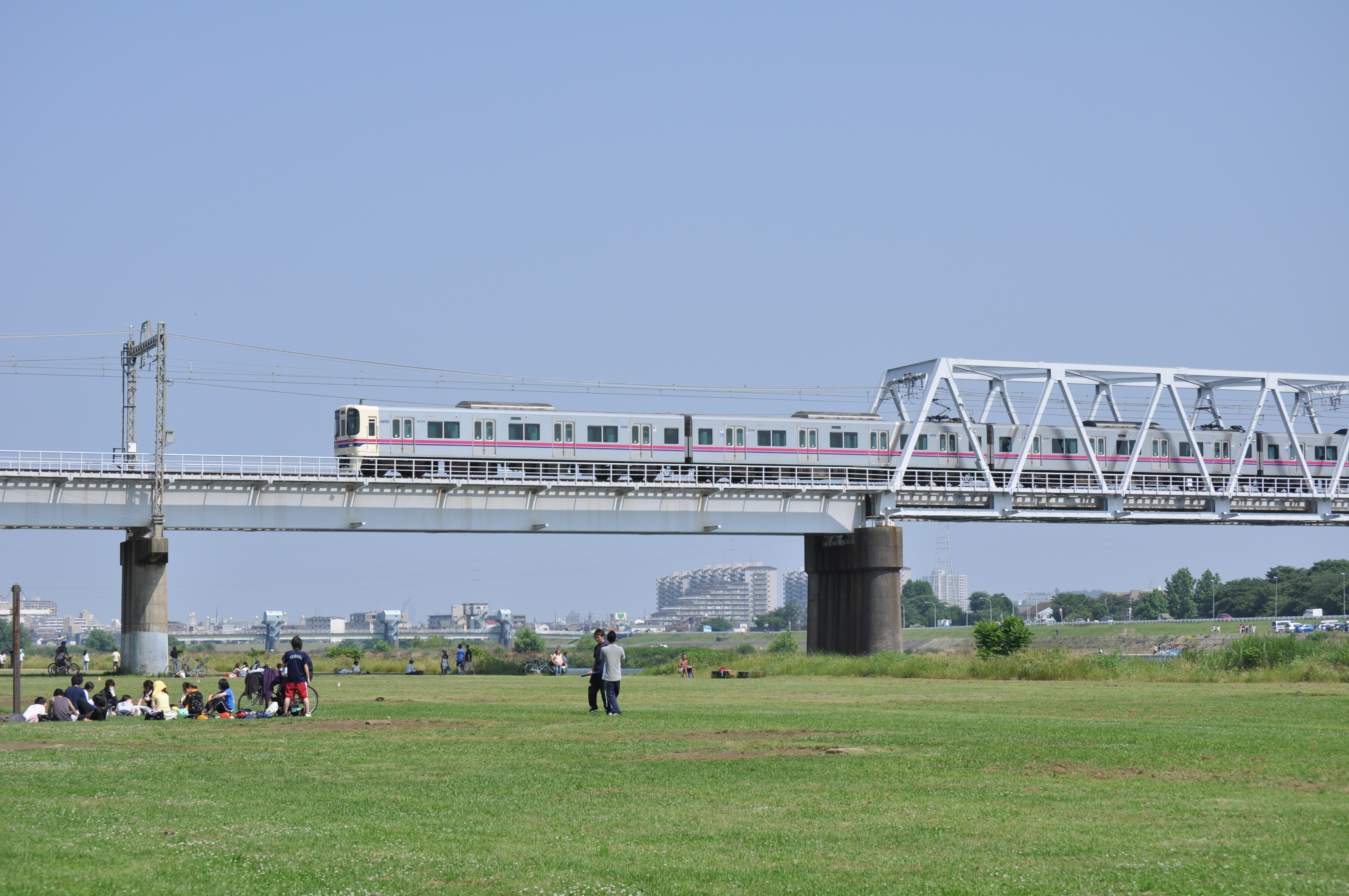 多摩川